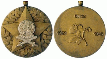 Pamětní medaile odbojové skupiny Trávnice. Trávnice byla ilegální vojenská odbojová (povstalecká) skupina založená v roce 1944. Jejími zakladateli byli štábní kapitán Adam Wohlrath a podporučík v záloze Ing. Alois Kraus. Skupina působila převážně ve Vršovicích a měla spojení s menšími odbojovými povstaleckými skupinami v Hostivaři, Chodově, Řevnicích, Kunraticích a Uhříněvsi. Během pražského květnového povstání 1945 splnila skupina Trávnice svoje vymezené regionální bojové úkoly a své odbojové poslání dobře. Po skončení druhé světové války ale její velitelé příliš nadhodnocovali svoje velitelské zásluhy v pražském povstání a tak byla úloha povstalecké skupiny Trávnice v éře komunistické historiografie silně bagatelizována a někdy i zcela popírána.